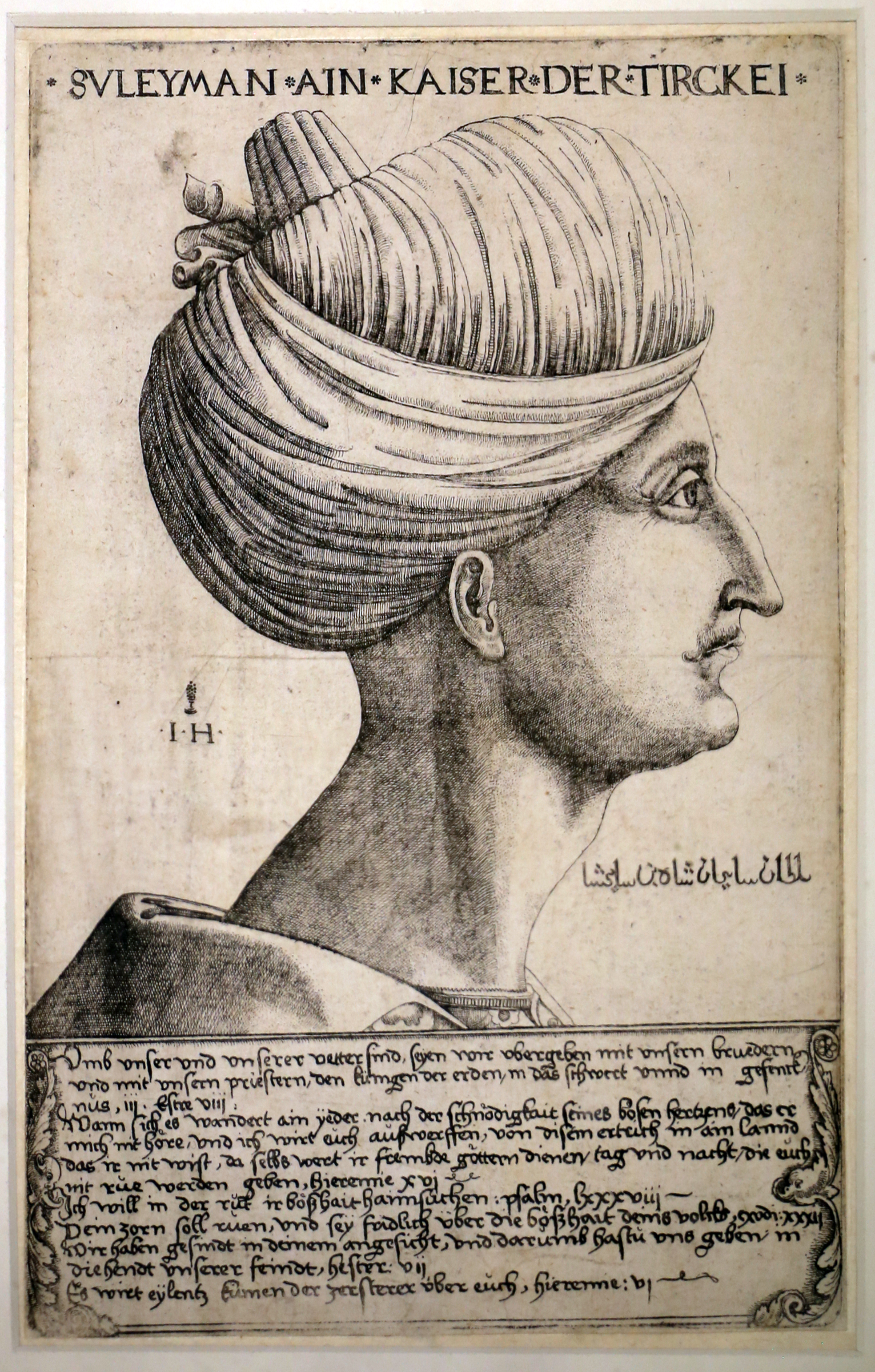 Palazzo Lanfranchi This is a photo of a monument which is part of cultural heritage of Italy.